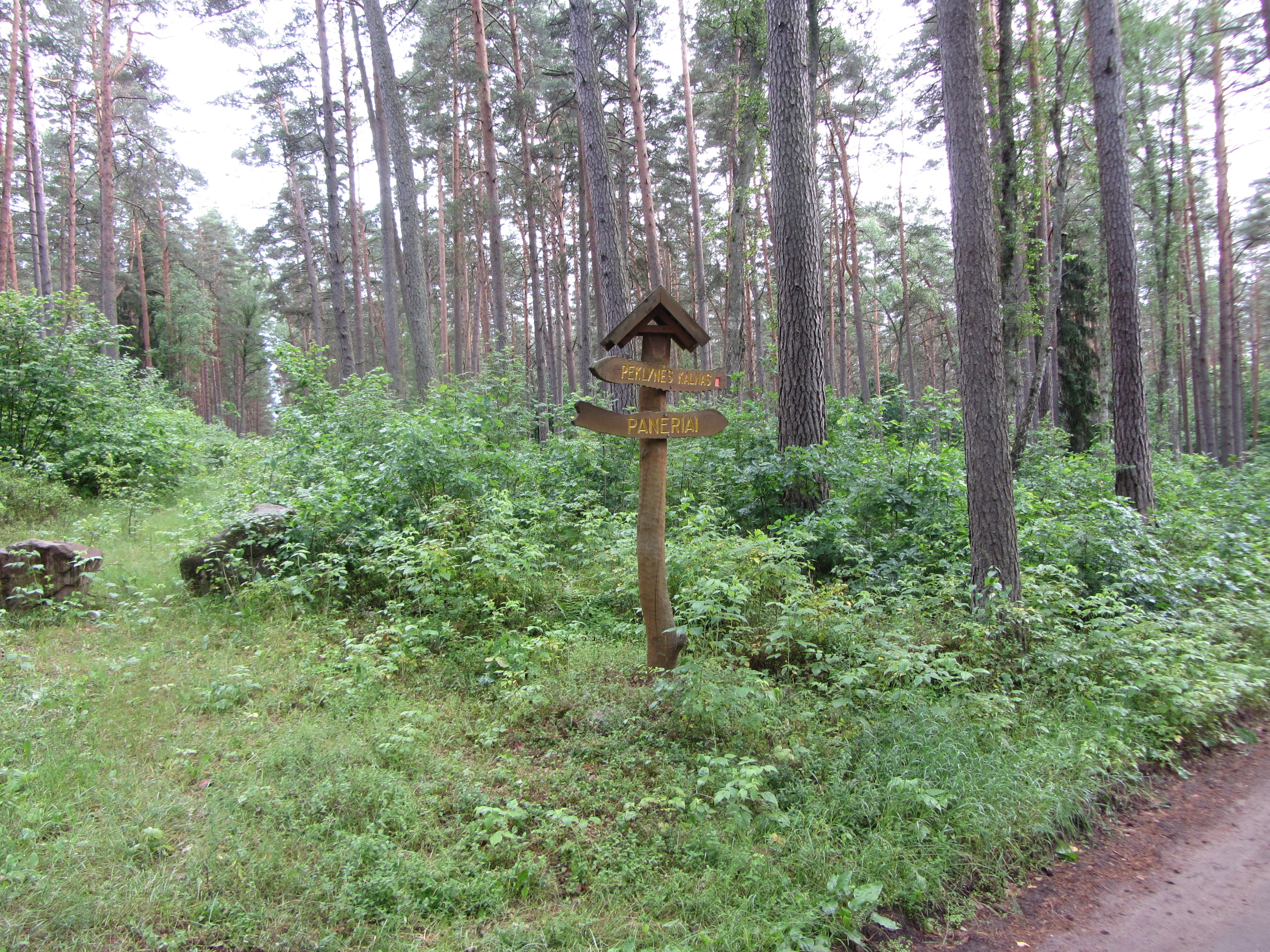 Vievio sen., Lithuania